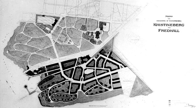 Ritningsskiss till reglering av egendomarna Kristineberg och Fredhäll av P.O. Hallman